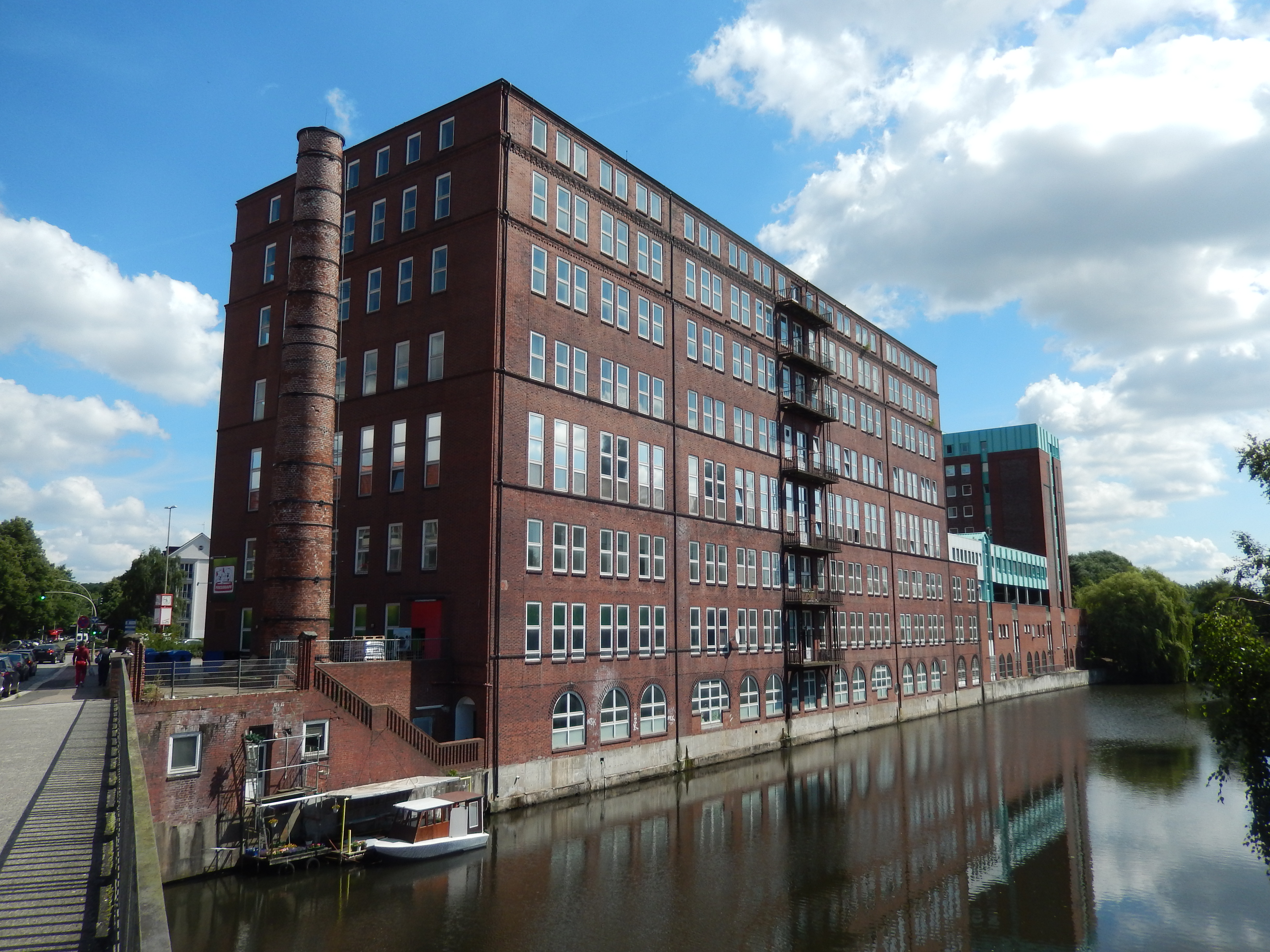 Gebäude "Alte Backfabrik" in Hamburg-Hamm